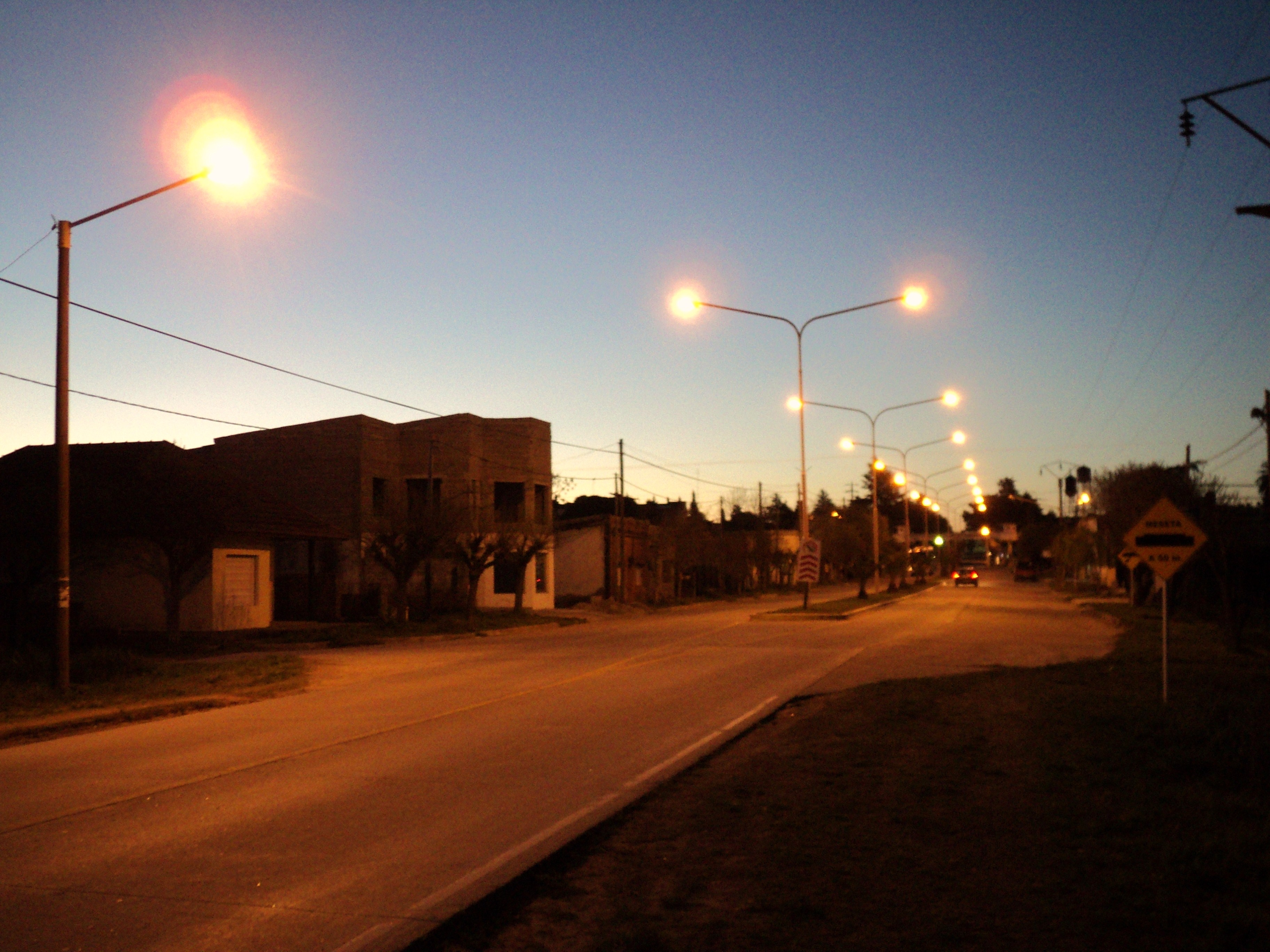 vista de las calles de sierra chica